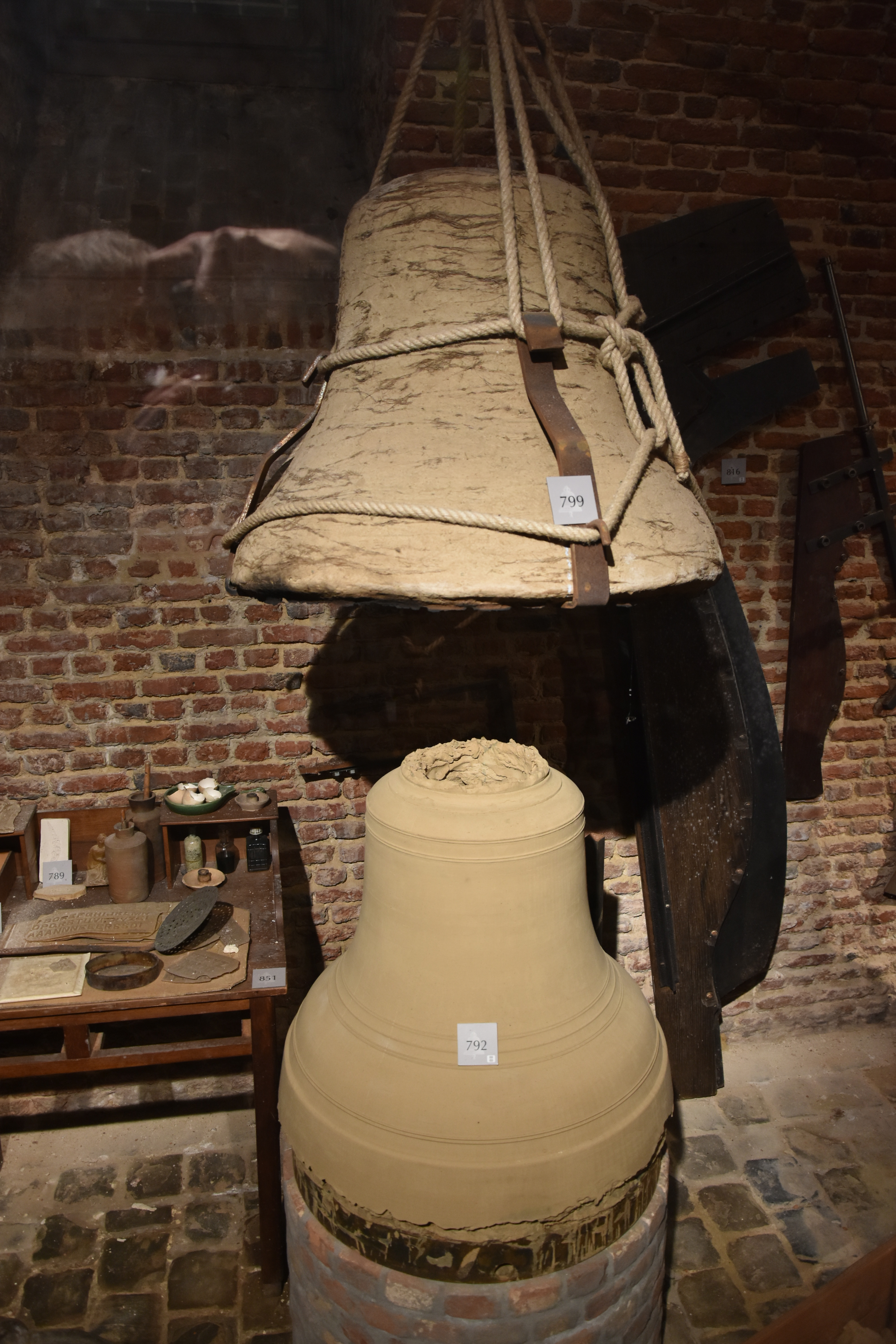 Klokkengieten Vleeshuis Antwerpen 27-12-2018